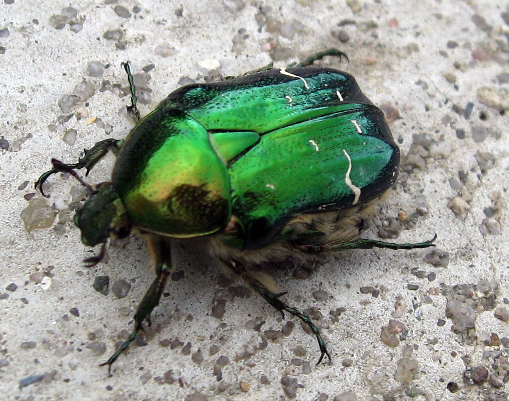 Cetonia aurata